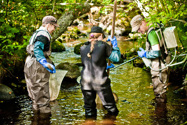 EKOenergie Flussanierungsprojekt